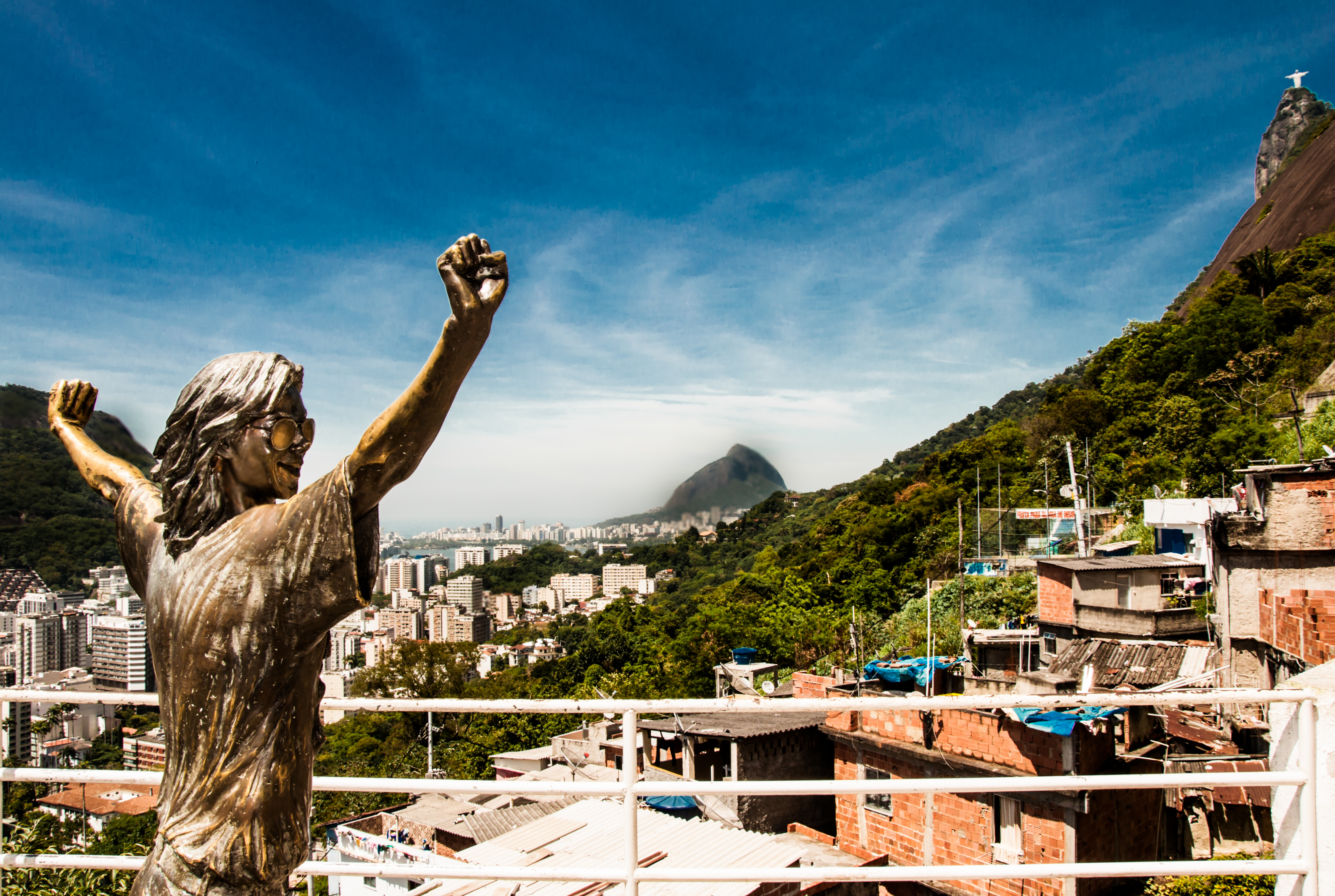 Monumento em homenagem ao cantor e dançarino Michael Jackson, localizada na Favela Santa Marta, Rio de Janeiro, Brasil.